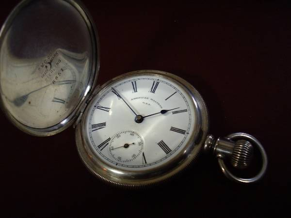 pocket watch